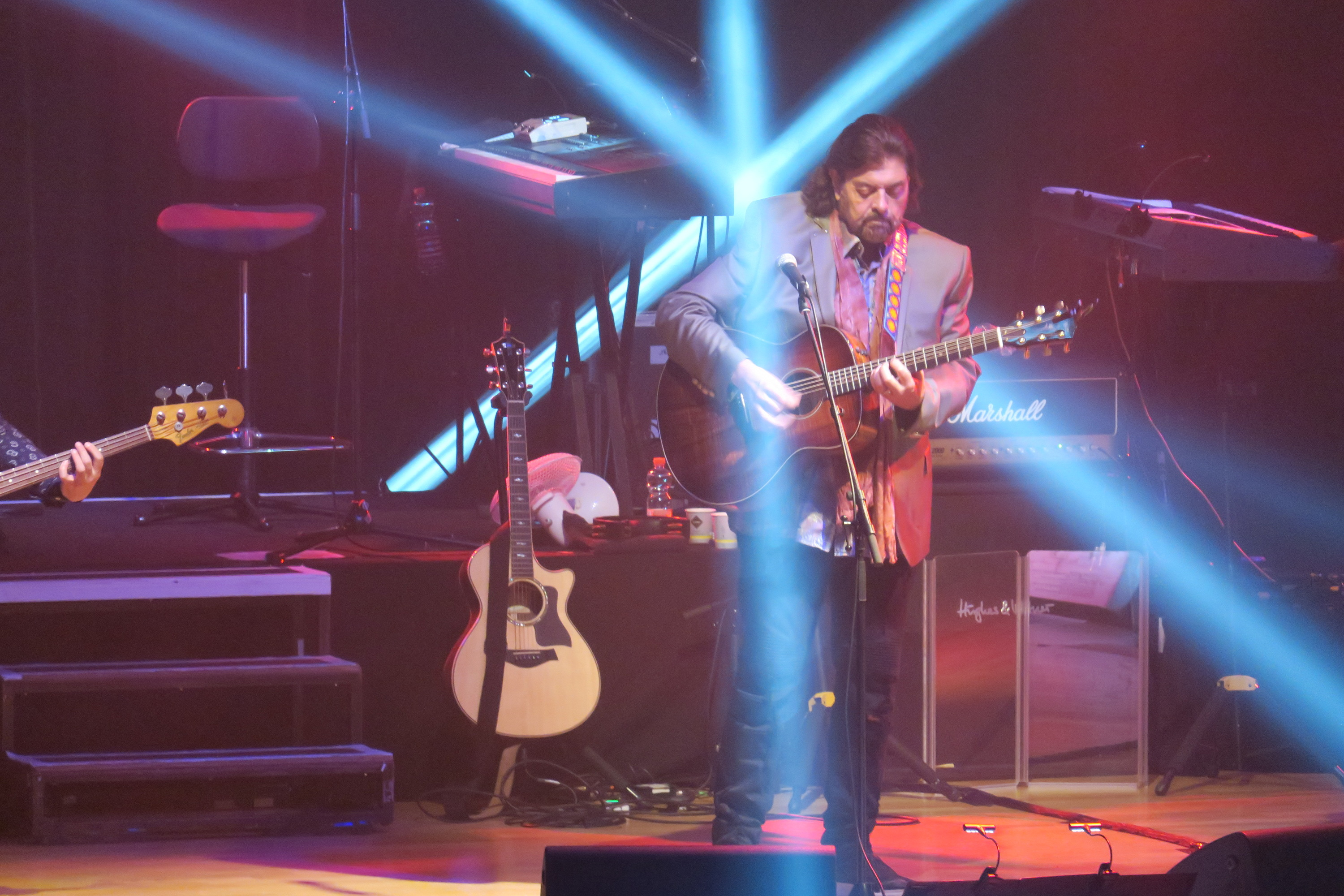 Alan Parsons, 2017-05-19, Konzert "Alan Parsons Live Project - The Greatest Hit Tour 2017, Harmonie Heilbronn